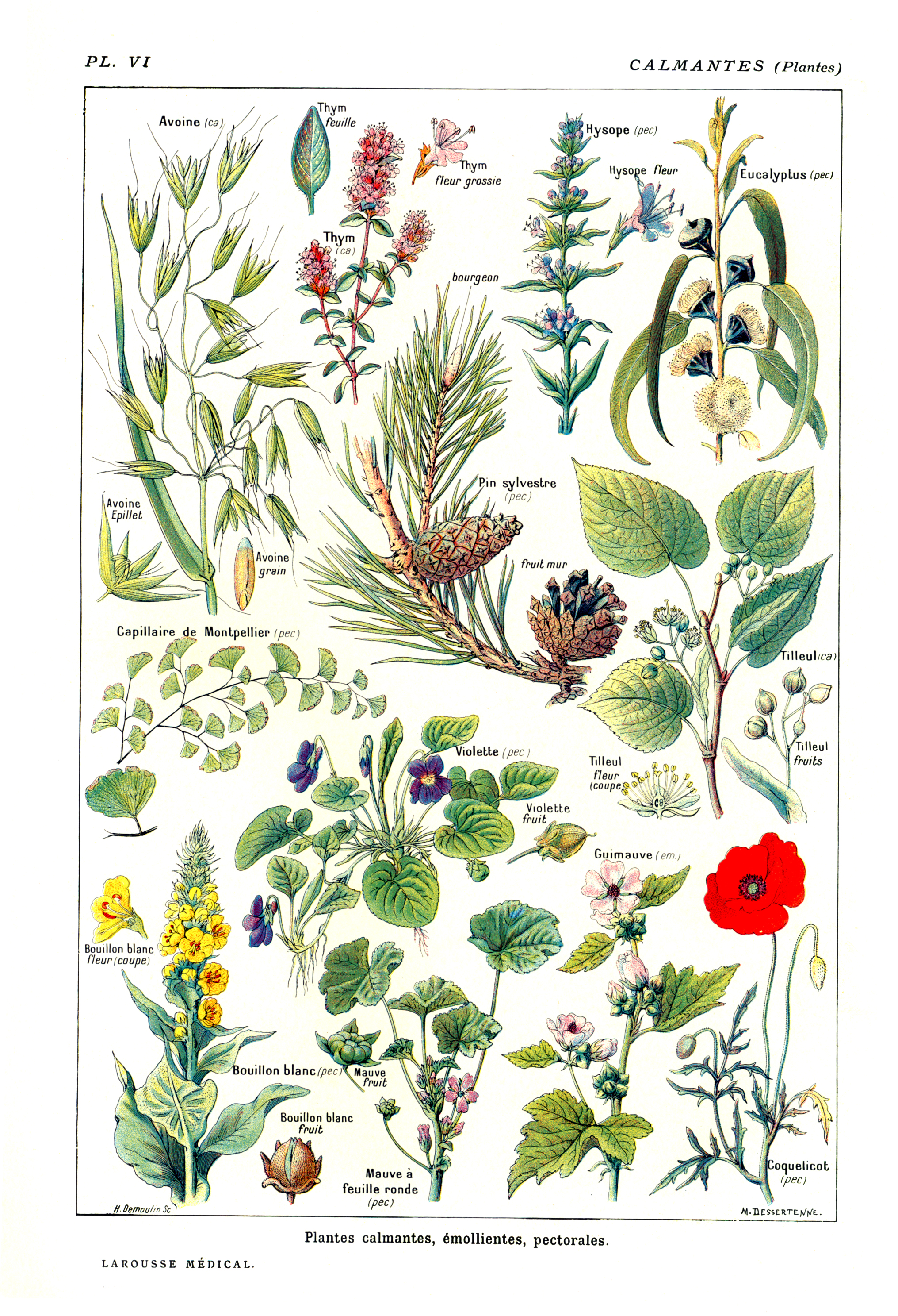 Plantas calmantes, emolientes, peitorais. p.175 Larousse Medical Illustré, Paris, 1912. Galtier-Boissière (org.)